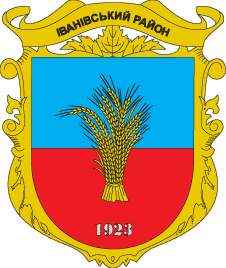 Герб Іванівського району(Херсонська область)